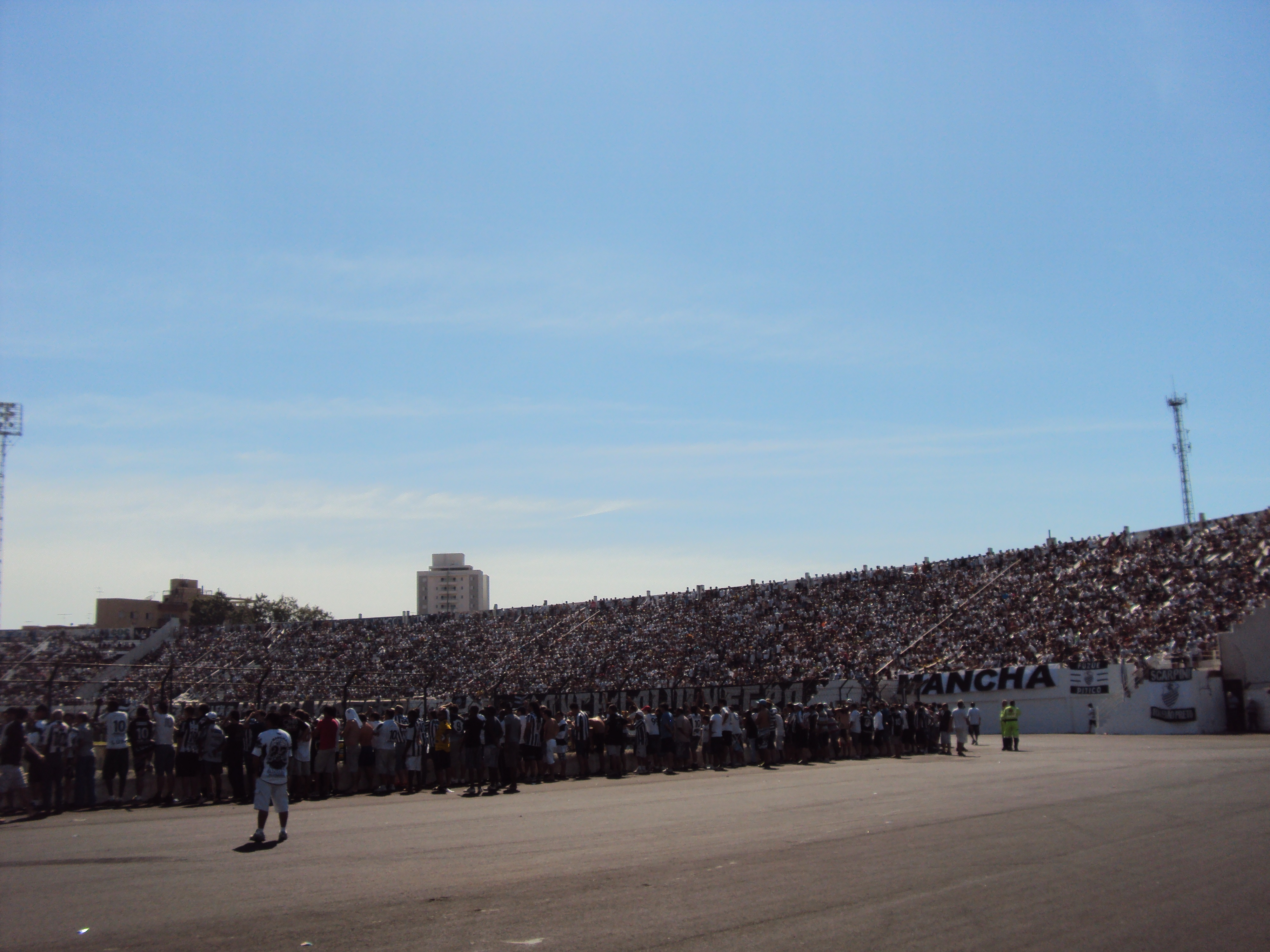 A massa alvinegra esteve presente em grande número na Jóia de Cimento, no jogo do acesso contra o Capivariano.